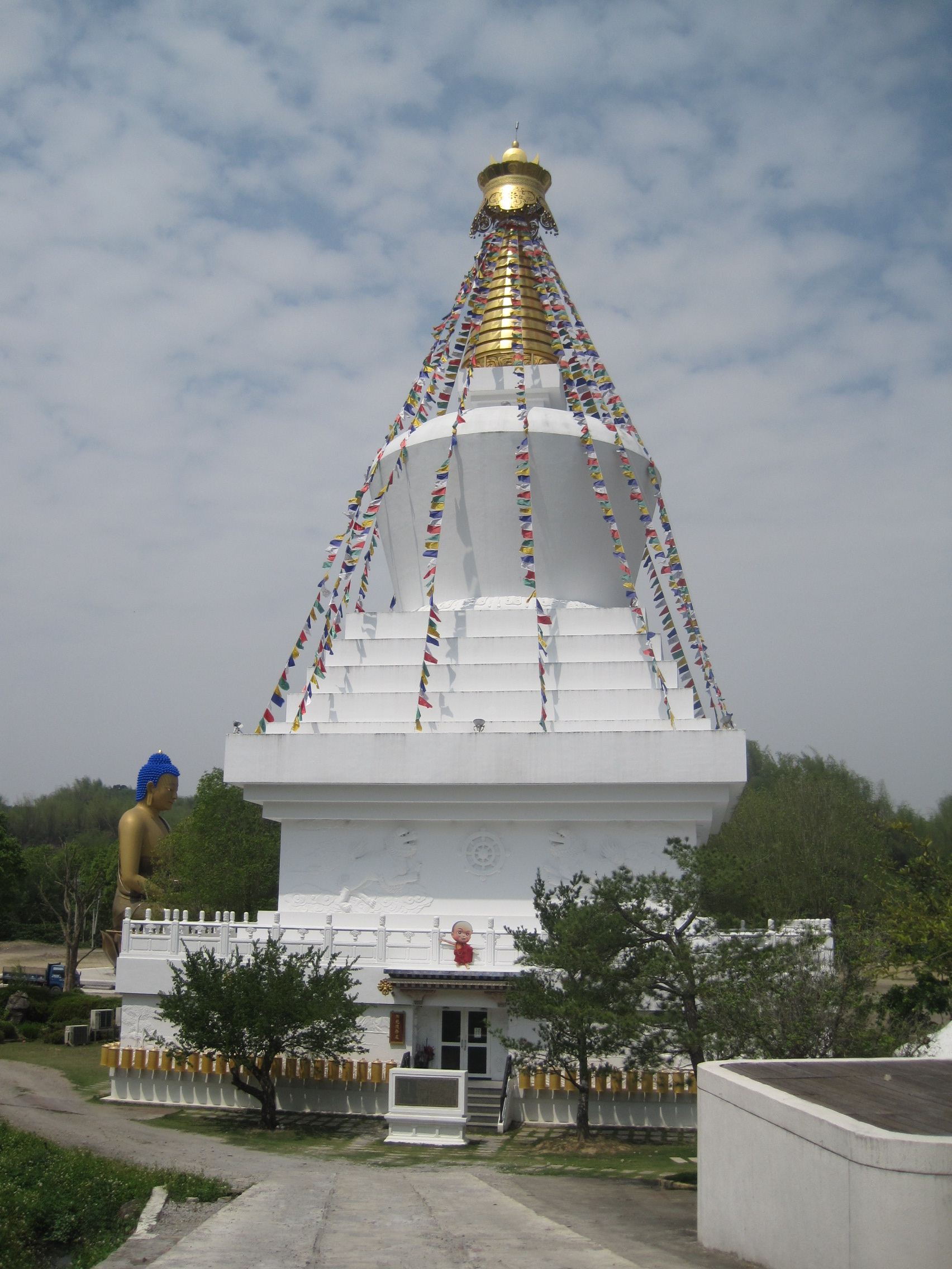 噶瑪噶居寺舍利塔